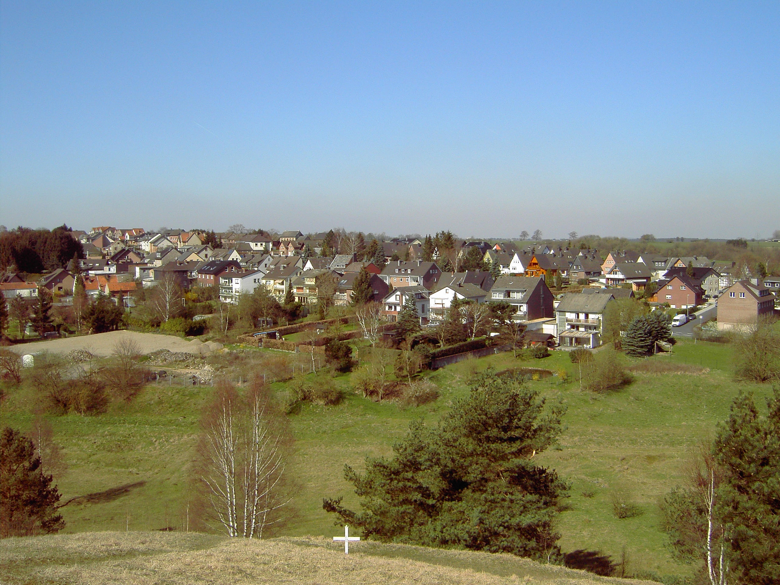 Dat is Breinigerberg